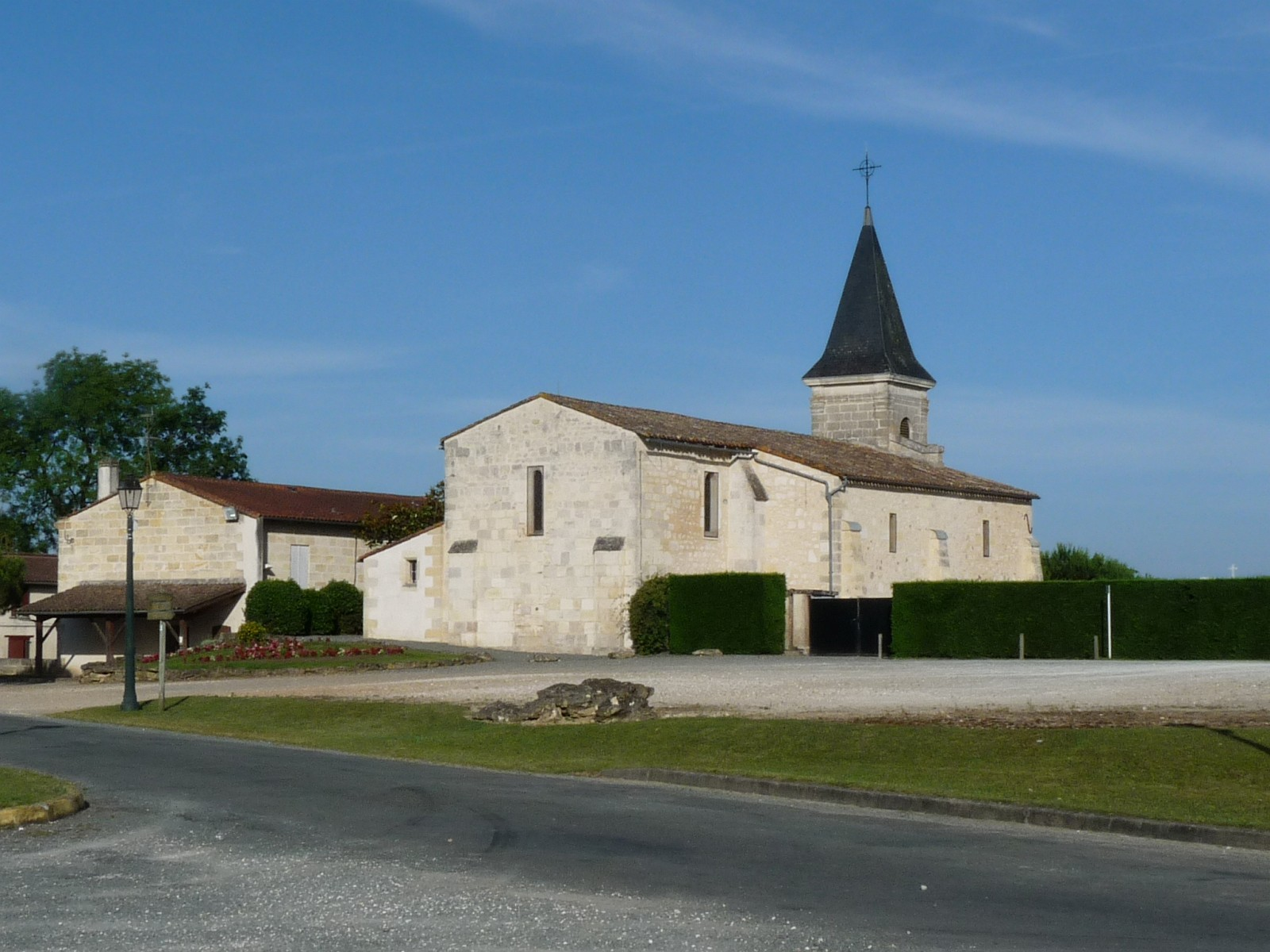 Eglise du Fieu, Gironde, France